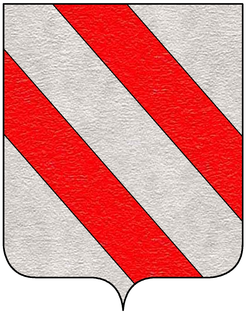 Stemma della famiglia Ferretti